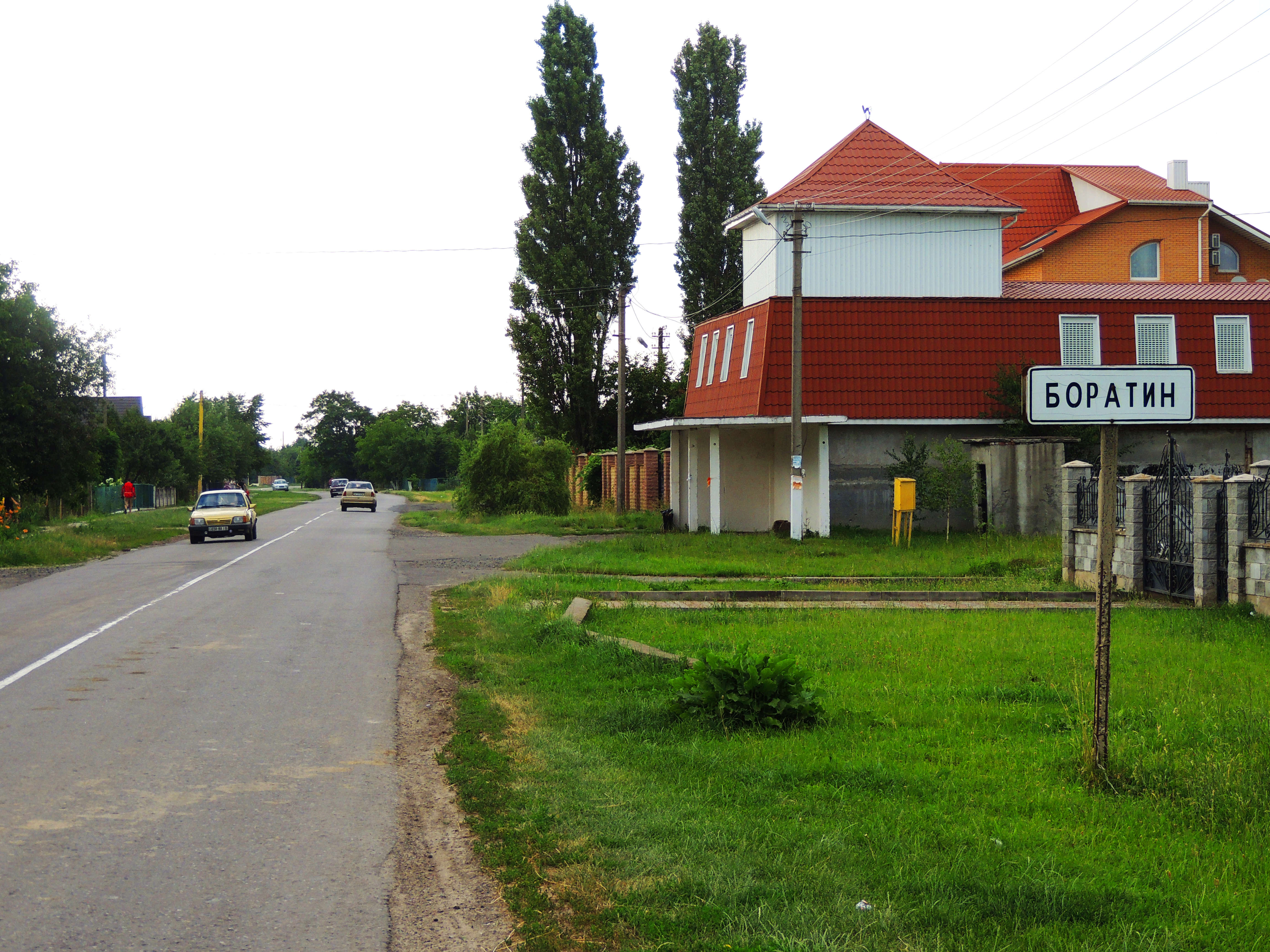 Початок села Боратин з півдня